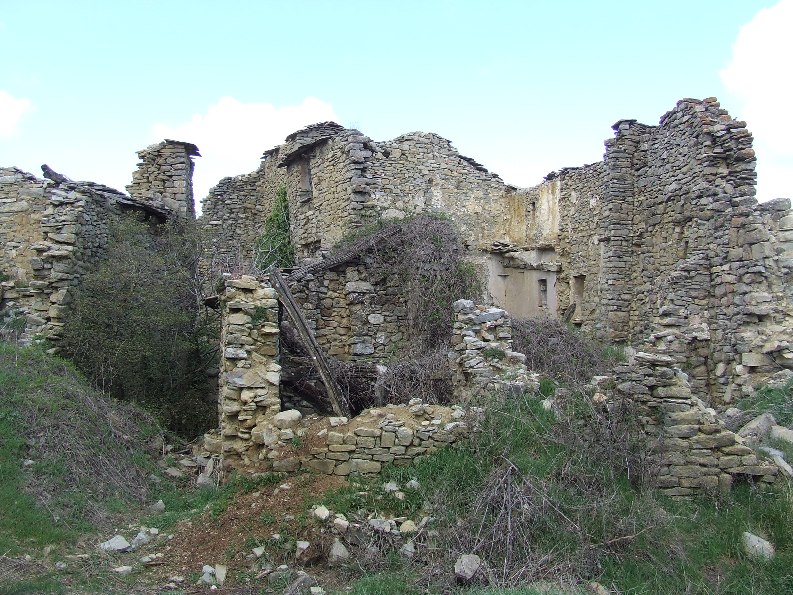 Estat actual de la meitat de la part superior de Castellnou de Montsec (Sant Esteve de la Sarga, Pallars Jussà)